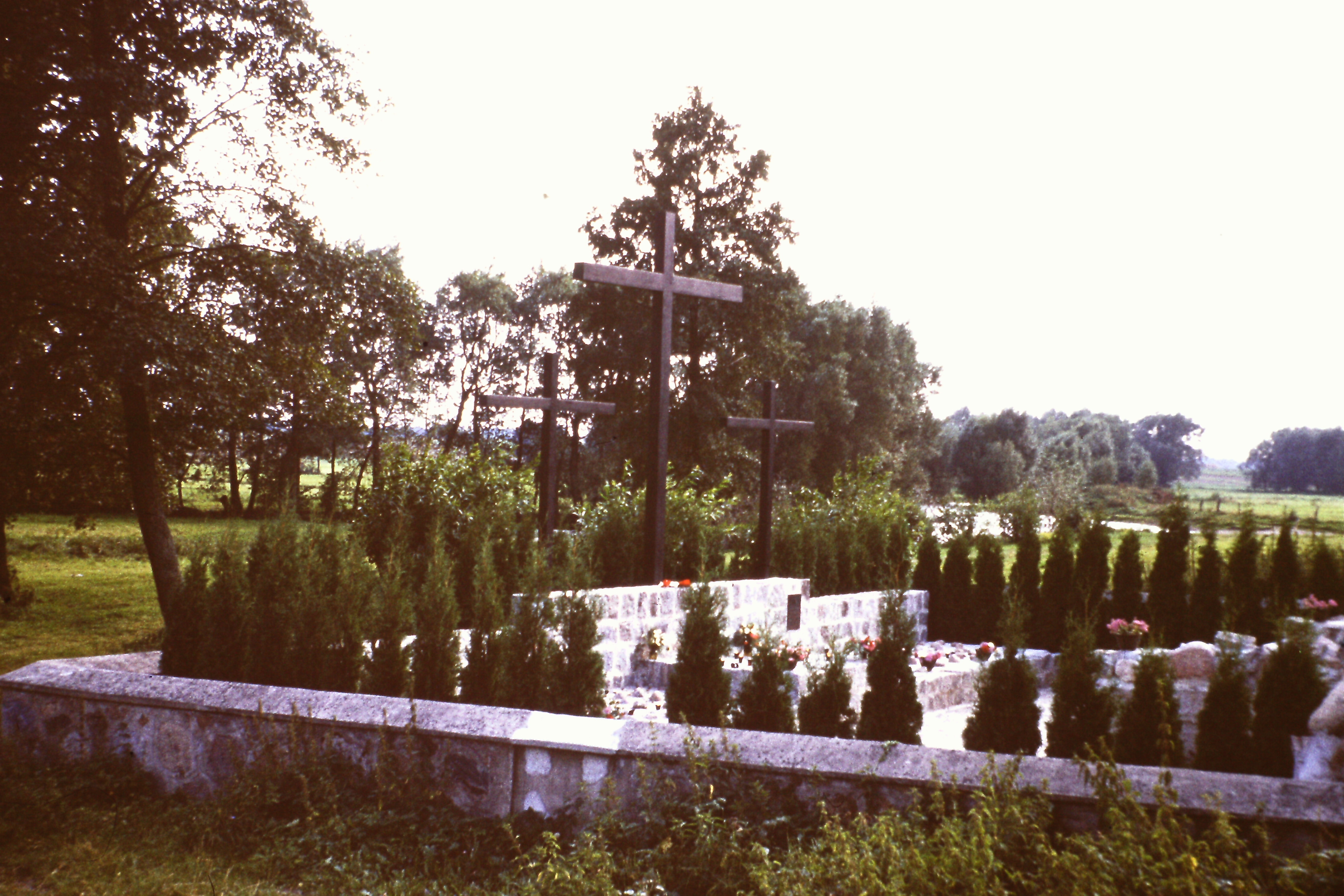 Mauzoleum 18 Dywizji Piechoty w Andrzejewie - widok ogólny; 1975 rok